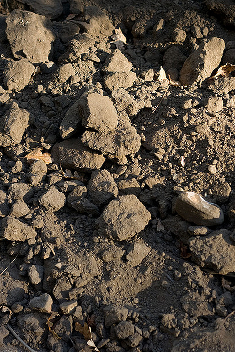 Terroir de la vallée de Constantia